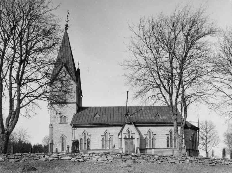 Kyrkan mot söder. Kategori: (01) ExteriörerKyrkan mot söder.